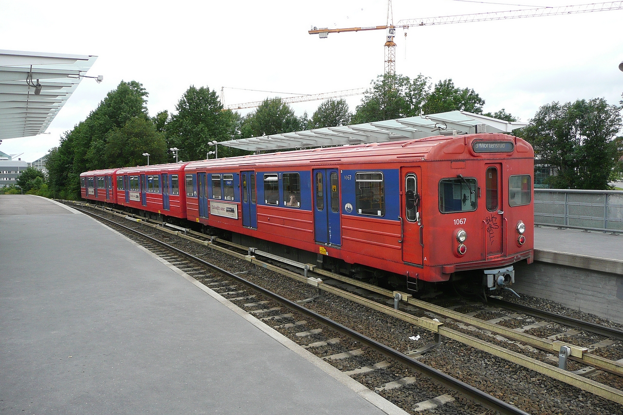 Forskningsparken stasjon